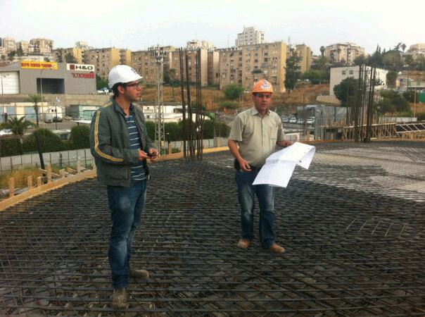 מהנדס ביצוע